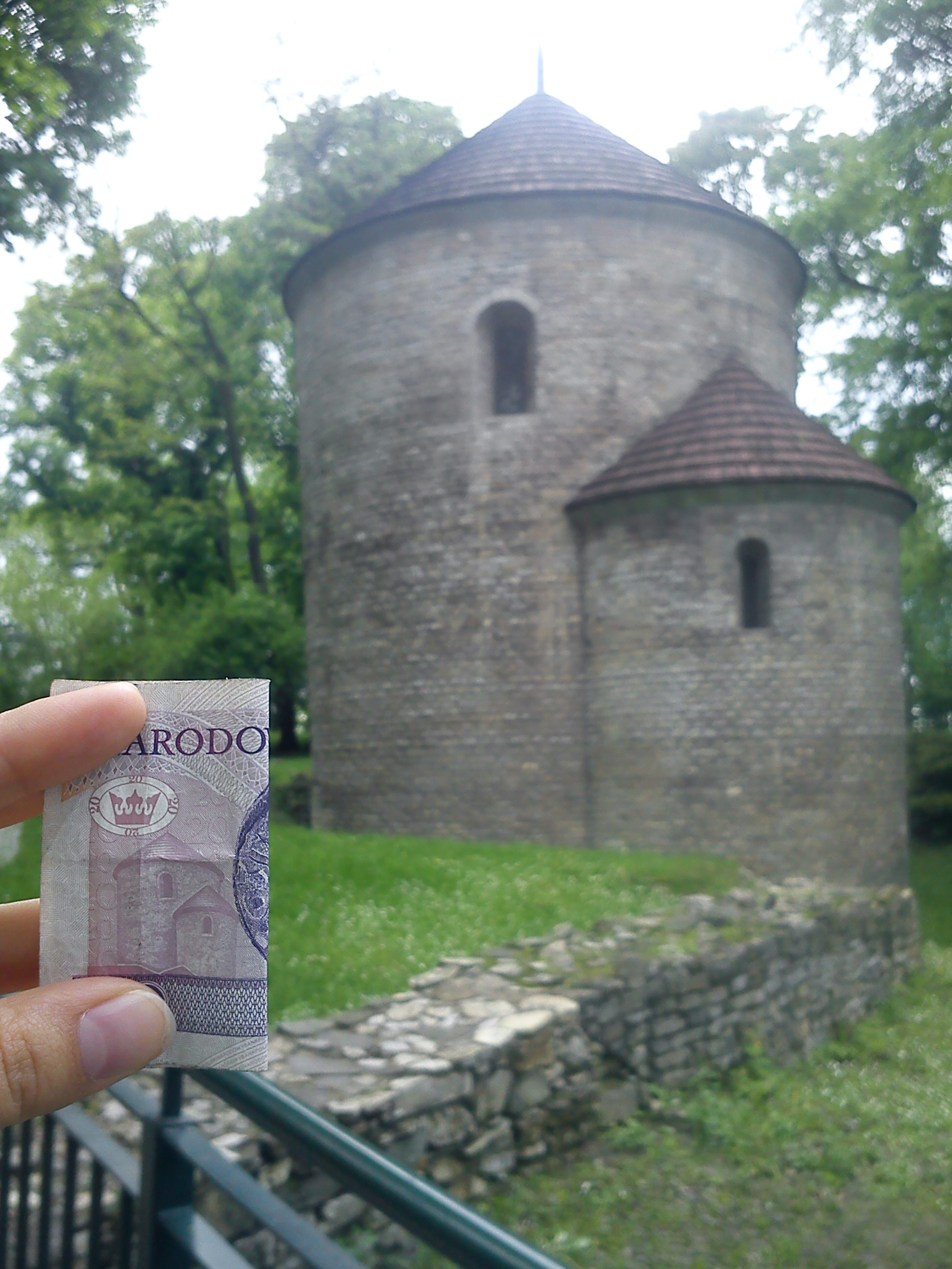 Cieszyn, kaplica zamkowa (rotunda) p.w. śś. Mikołaja i Wacława, 1 poł. XI w., 2 poł. XV w., 1839, XX w.